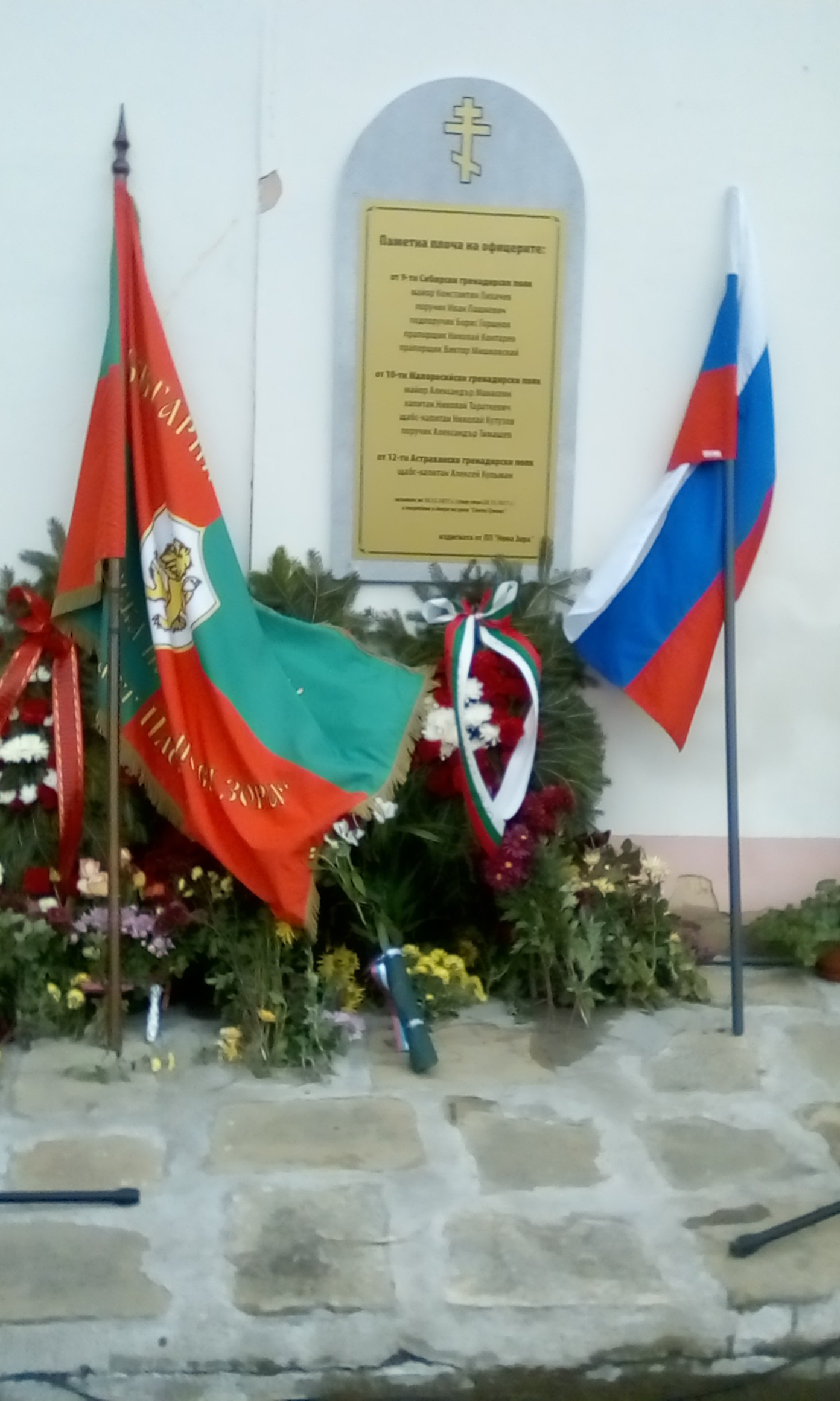 Паметна плоча на офицерите от 9-ти Сибирски гренадирски полк майор Константин Платонович Лихачев, поручик Иван Семëнович Пашкевич, подпоручик Борис Гаврилович Горшков, прапоршчици Николай Петрович Канторов и Виктор Игнатьевич Мешковский, от 10-ти Малоросийски гренадирски полк майор Александр Аксентьевич Манассеин, щабс капитан Николай Николаевич Кутузов, поручик Александр Александрович Тимашев, капитан Николай Павлович Тараткевич, от 12-ти Астрахански гренадирски полк щабс капитан Алексей Петрович Кульман убити на 28 ноември 1877 г. и погребани до олтара на църква Света Троица в с. Горна Митрополия